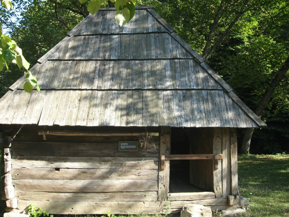 спољашњост